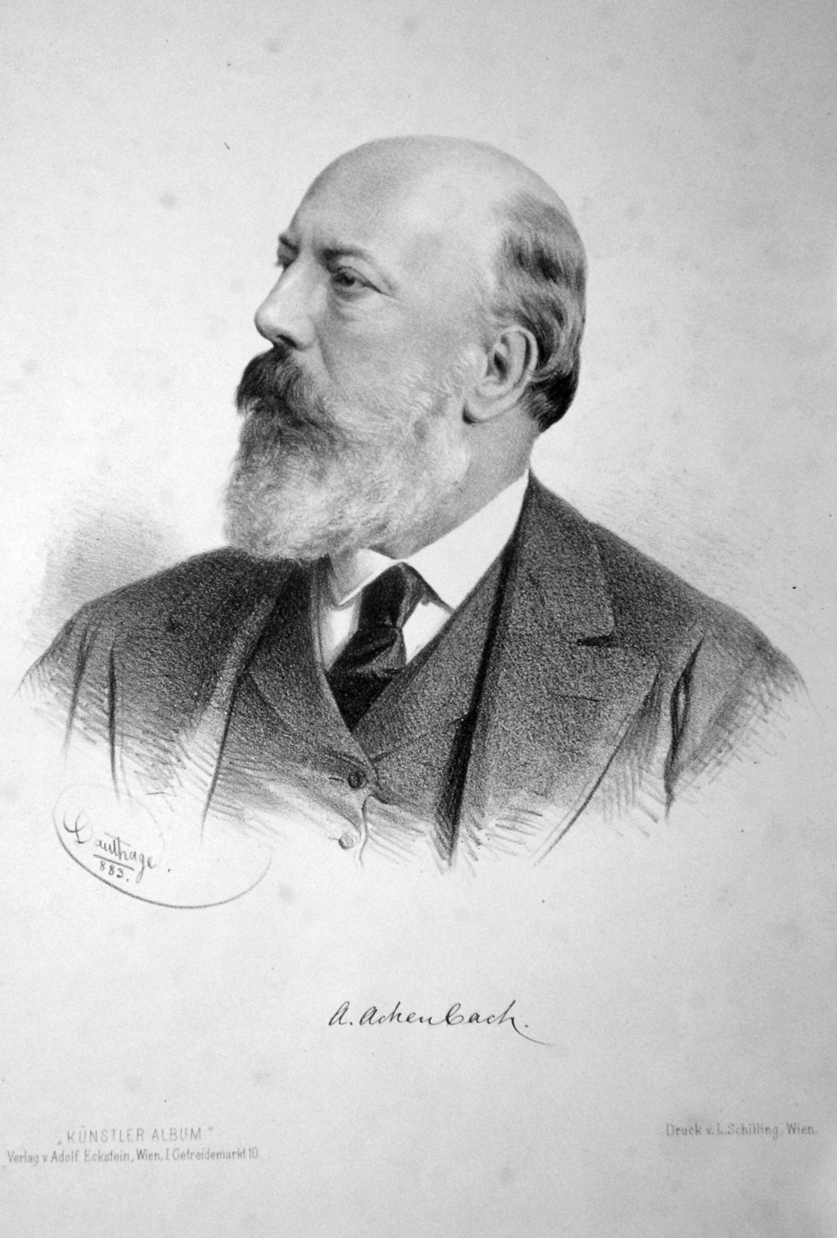 Andreas Achenbach (1815-1910), Maler. Lithographie von Adolf Dauthage, 1883. Aus der Serie "Künstler-Album", Verlag A. Eckstein, Wien